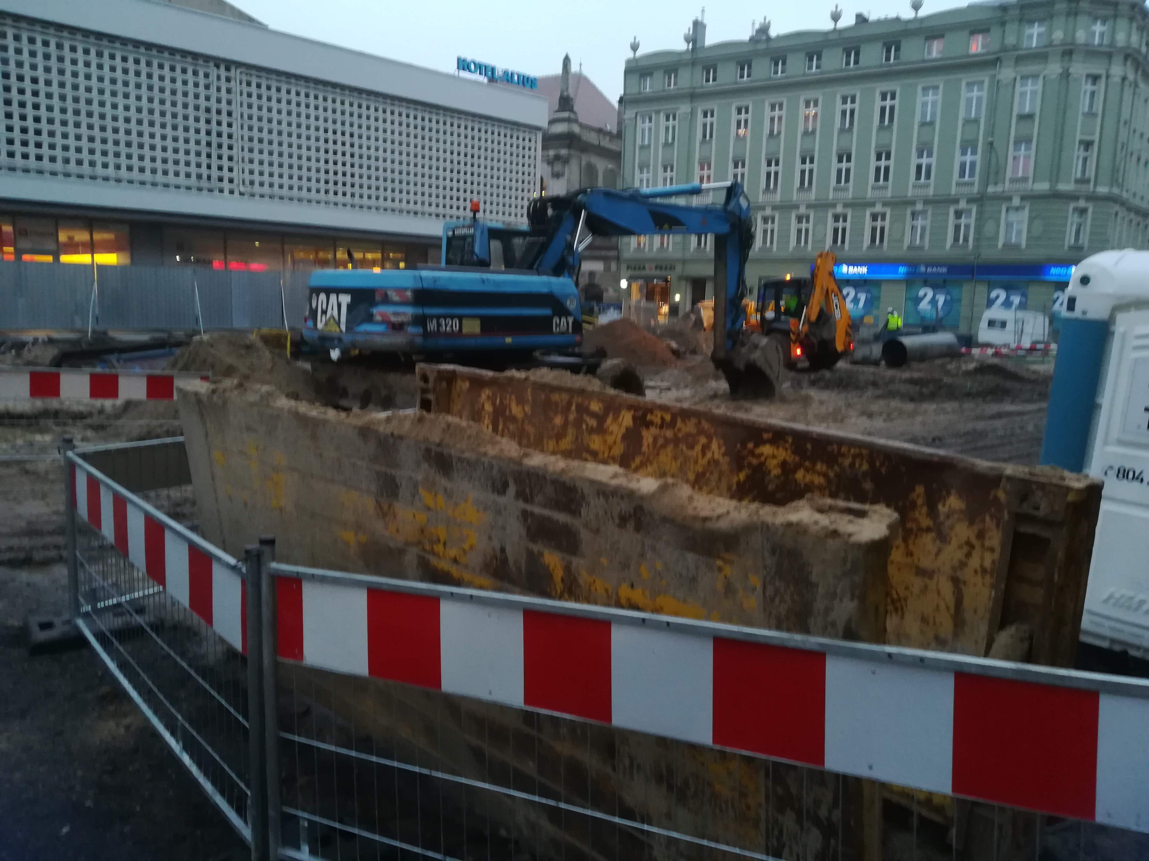 Remont Świętego Marcina w Poznaniu w grudniu 2017r.